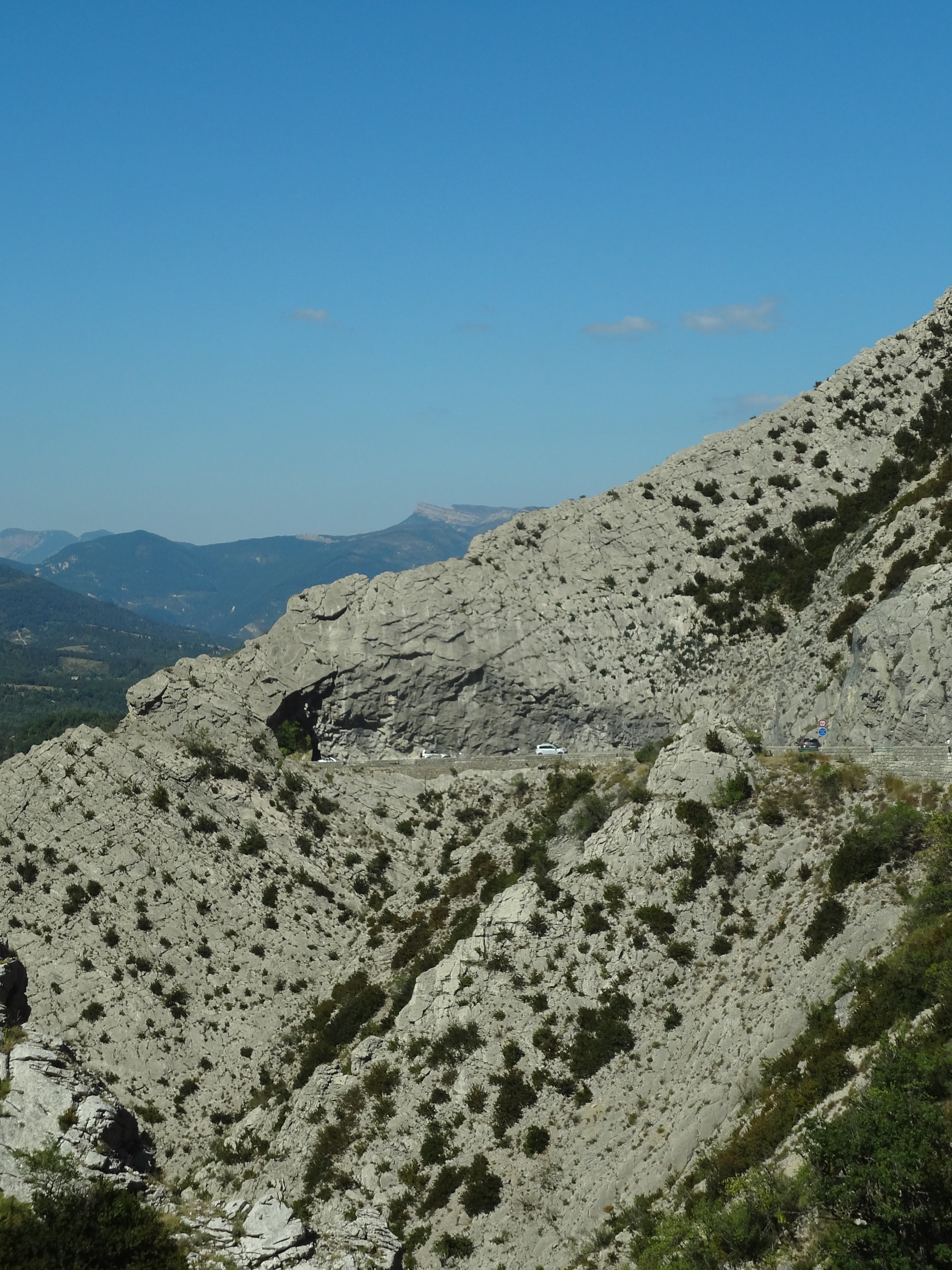 La clue de Taulanne est un passage resserré emprunté par l'ancienne RN 85 (ou route Napoléon), actuellement RD 4085, à environ 1000 m d'altitude (1007 m à la Roche Percée).